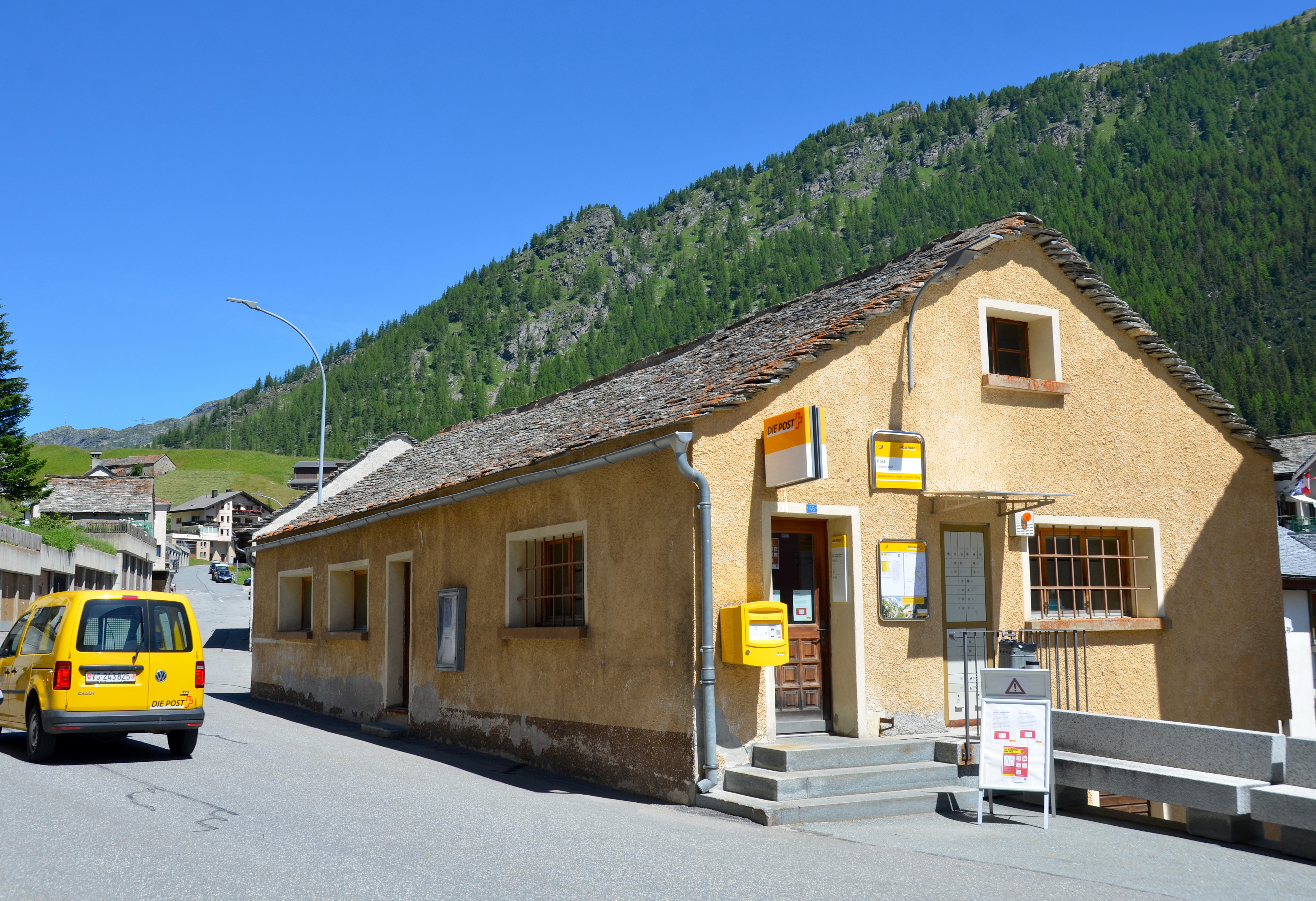 Post Filiale 3907 Simplon Dorf im Wallis (Schweiz)